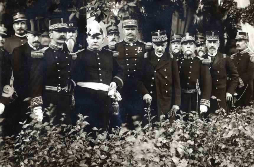 Grupo histórico de militares chilenos en honor del General Manuel Bulnes Pinto al ser nombrado Ministro de Guerra y Marina, en septiembre de 1896. Presentes de izquierda a derecha: Teniente Coronel Santiago O'Ryan, Intendente Carlos Bories, General Alejandro Gorostiaga, General Fernando Lopetegui, General Manuel Bulnes Pinto, Coronel Aníbal Farias, General Emilio Körner, General Manuel Baquedano (última fotografia antes de su muerte), Coronel Waldo Silva Palma, General Estanislao del Canto, Coronel Pedro M. Rivas Cruz, General Joaquín Cortes y General José M. Novoa.- (Información en Chile a Color, Tomo 3, página 1257)